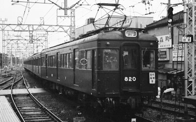 阪急 820 1980年頃 西ノ宮北口駅